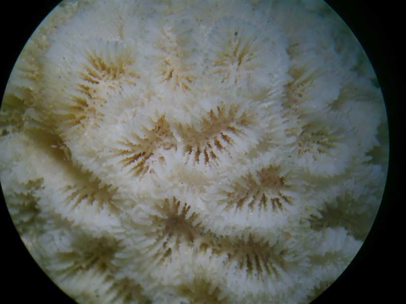 Mussismilia sp. en Campinas, São Paulo, Brasil, 2008